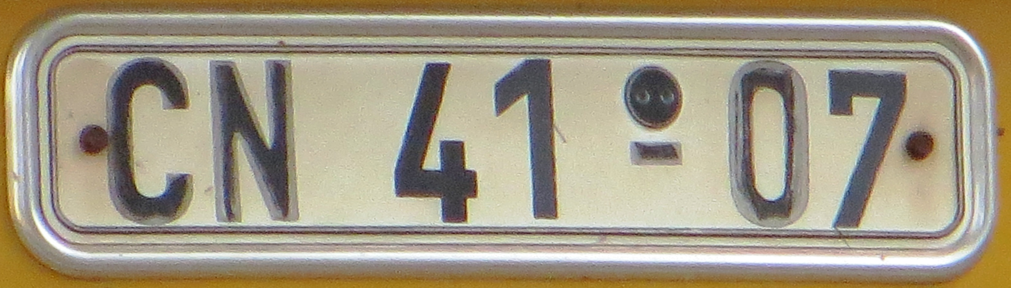 DDR kentekenplaat - Bezirk Neubrandenburg - Kreis Strasburg